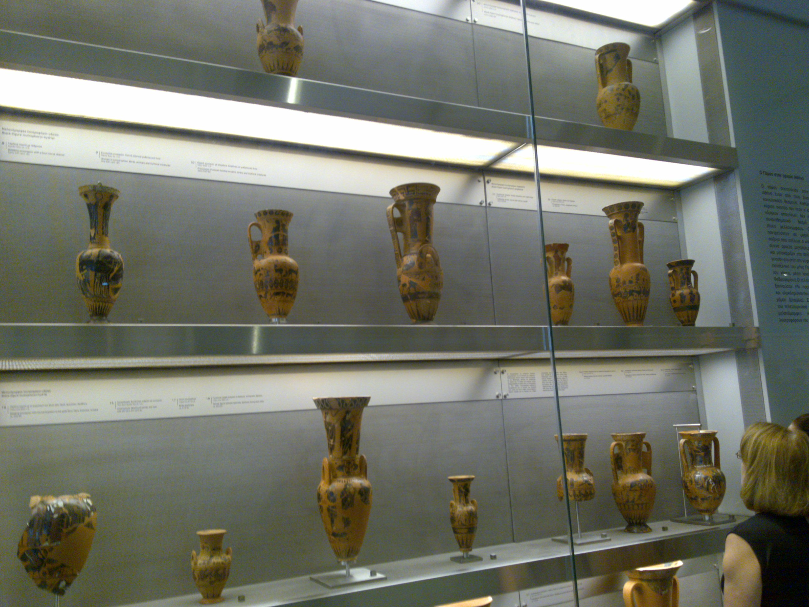 Acropolis Museum 2009